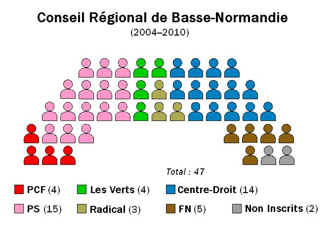 Composition du conseil régional de Basse-Normandie (2004-2010)